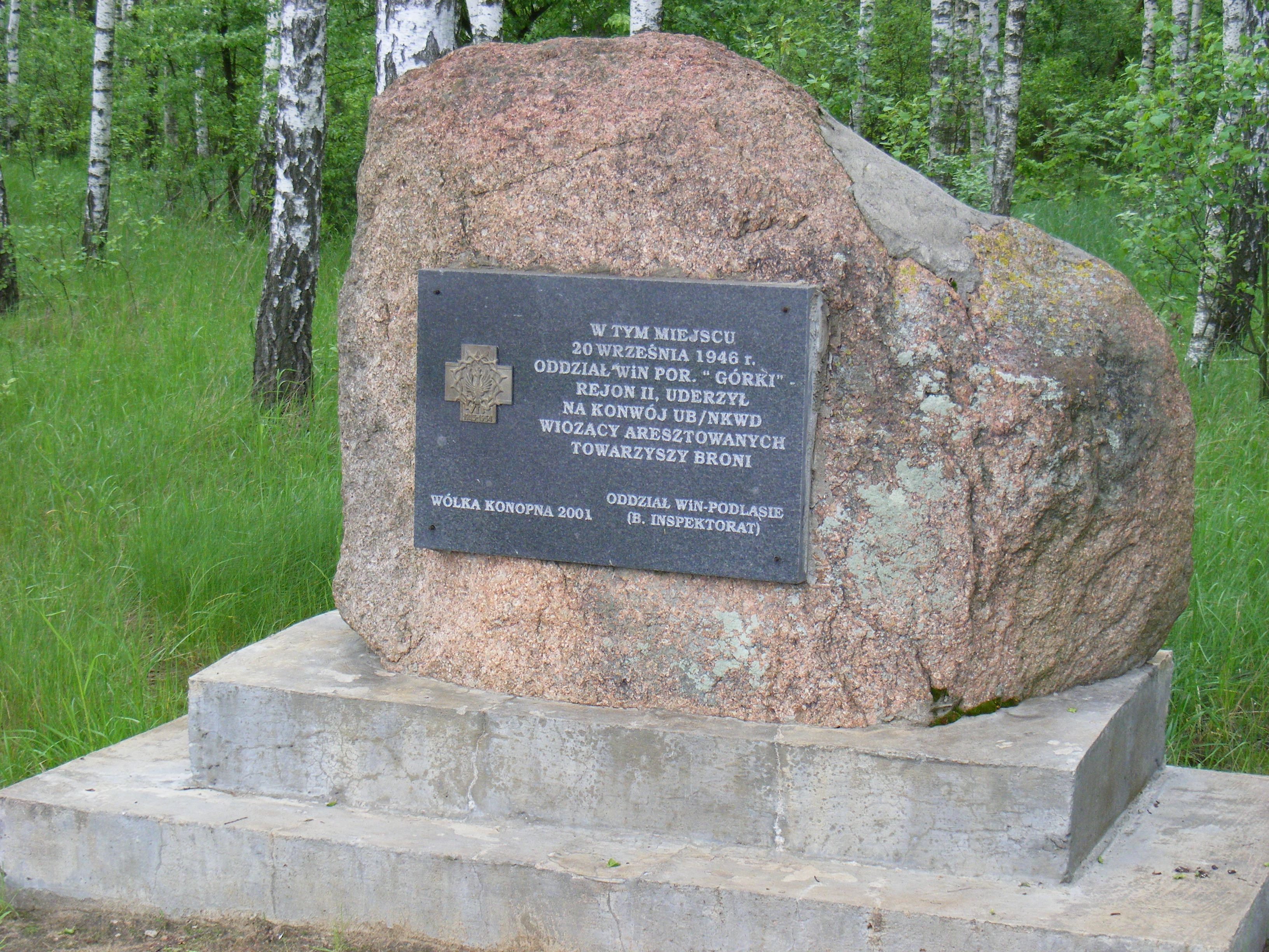 Głaz i tablica upamiętniająca miejsce potyczki partyzanckiej.